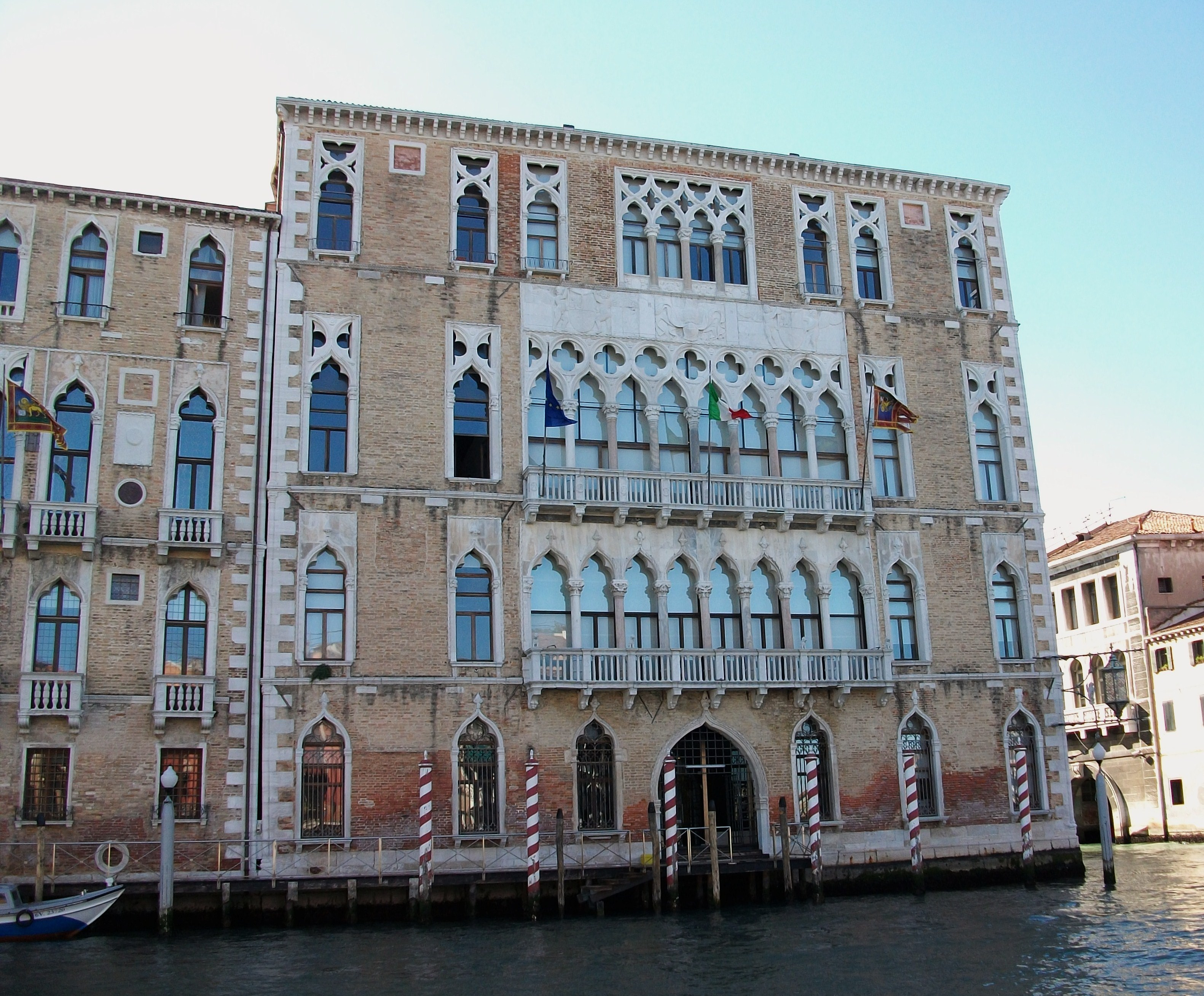 Ca' Foscari de Venècia.